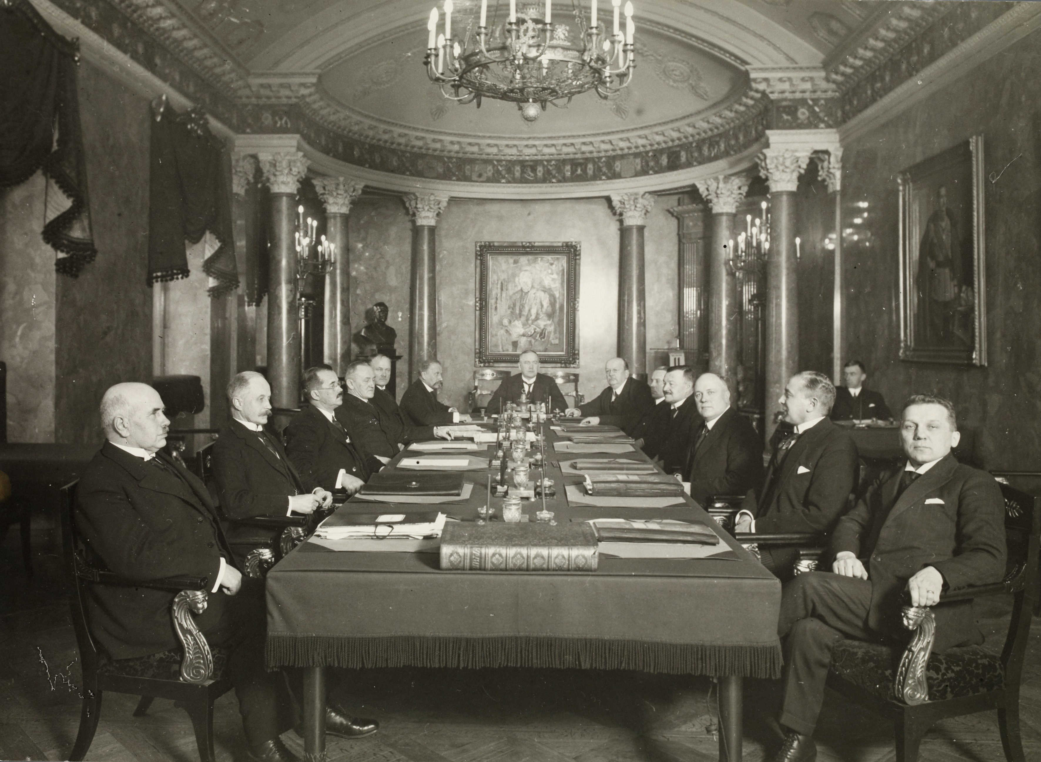 Kyösti Kallion II hallitus. Vasen rivi edestä: Kyösti Järvinen, Leonard Hjelmman, Vihtori Vesterinen, Juho Sunila, Emil Setälä ja Kyösti Kallio. Pöydän päässä presidentti Lauri Kristian Relander. Oikea rivi takaa: Lauri Ingman, Juho Niukkanen, Kalle Lohi, Gustaf Ignatius, Urho Castrén ja Tyko Reinikka. Taustalla Axel Charpentier.